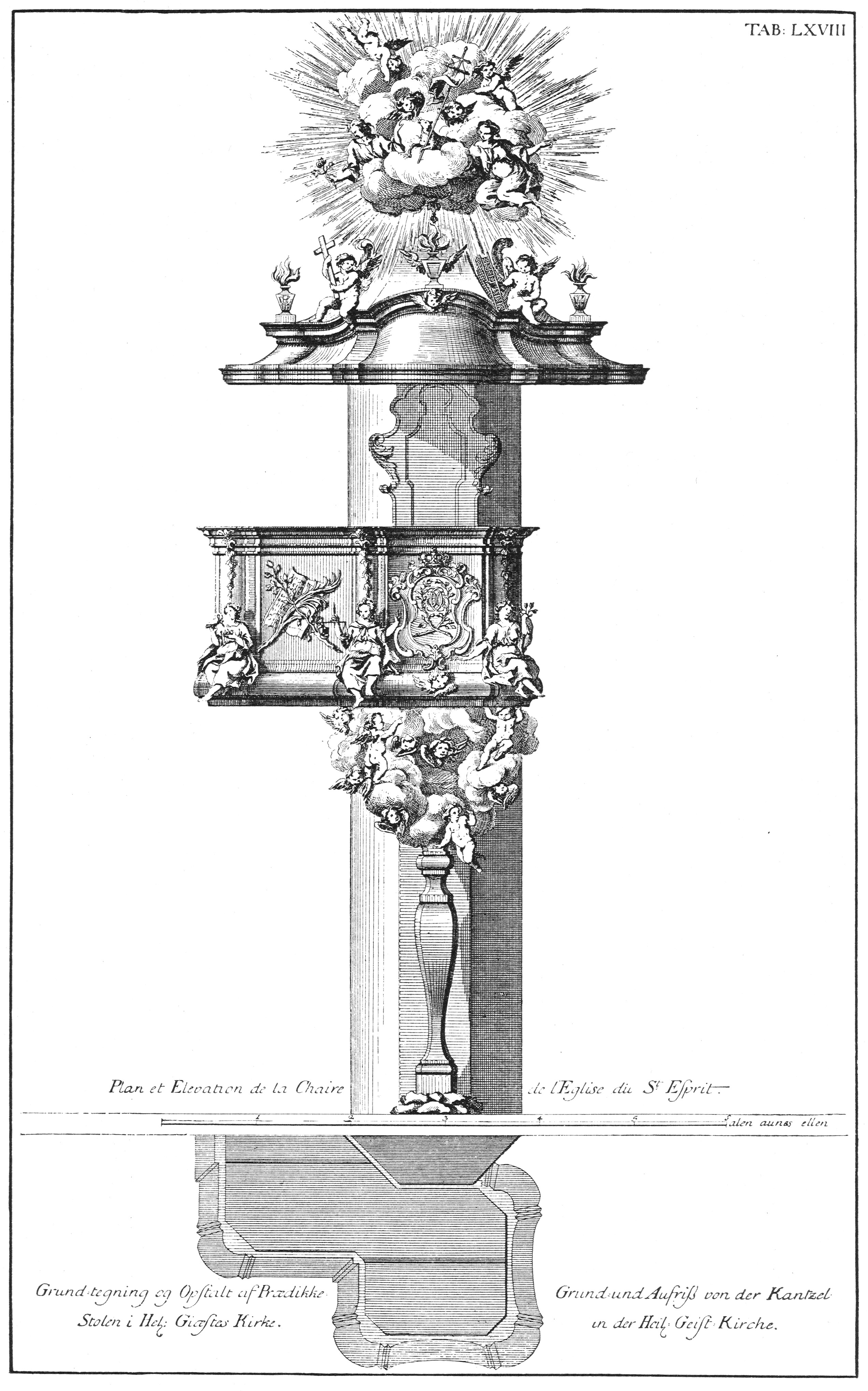 Helligåndskirken, Copenhagen, Denmark. Drawing of pulpit by Ehbisch from Den Danske Vitruvius, 1746.